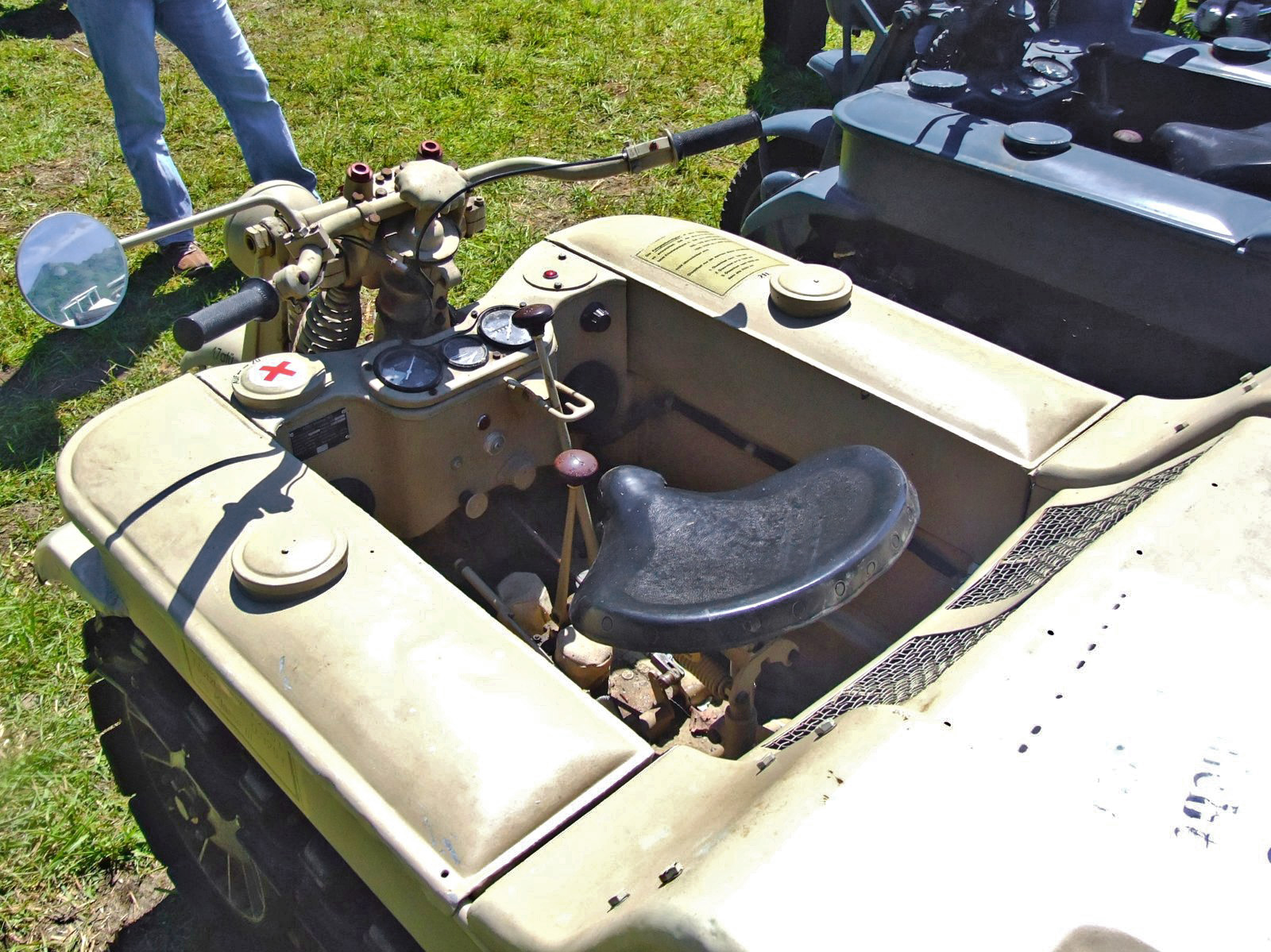 NSU Kettenkrad Typ HK 101 36 PS 4 Zylinder 70 km/h 1235 kg Eigengewicht Motor: Opel Olympia 1500ccm Steigfähigkeit: 48 Grad gebaute Stückzahl: 8345 Stück Quelle: selbst fotografiert, 05/2007 Fotograf: Späth Chr.